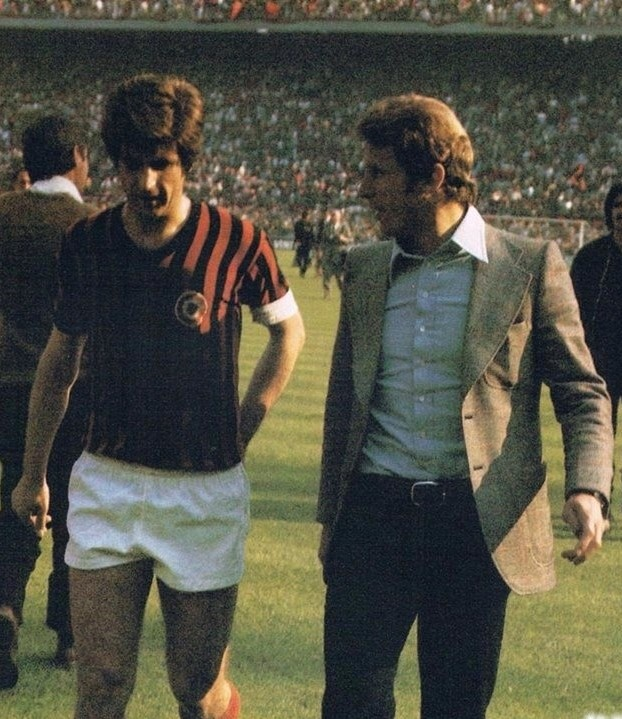 Milano (Italia), stadio San Siro, 12 maggio 1974. Da sinistra: Gianni Rivera e Giovanni Trapattoni, rispettivamene fantasista e allenatore dell'A.C. Milan, escono dal campo dopo il pareggio interno contro il Bologna F.C. (1-1) valevole per la 29ª giornata del campionato italiano di Serie A 1973-74.